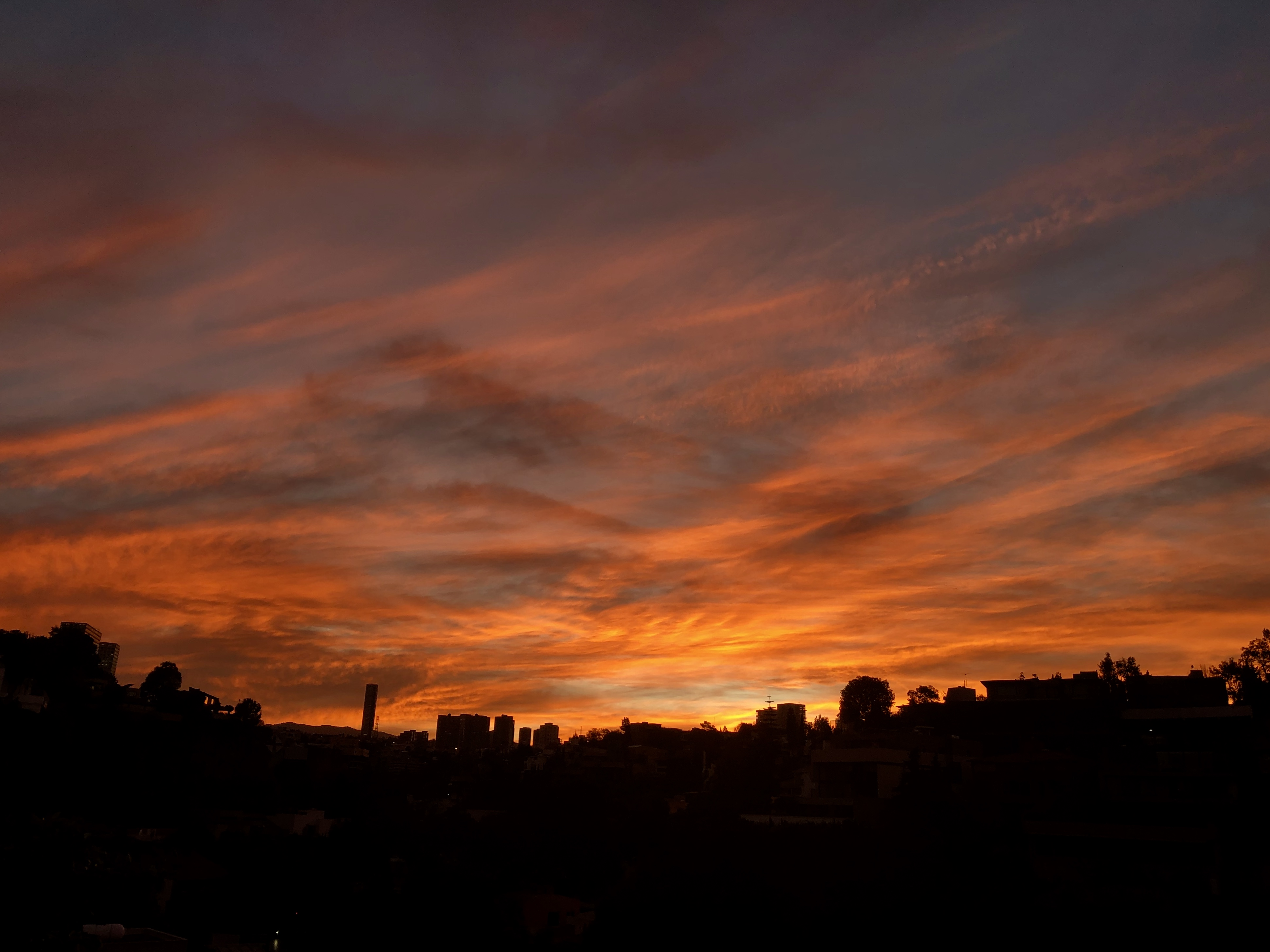 Tomada en 2019